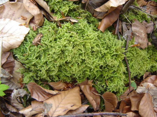 Weiches Kammmoos (Ctenidium molluscum) Habitus, Photo near Löberschütz in Germany